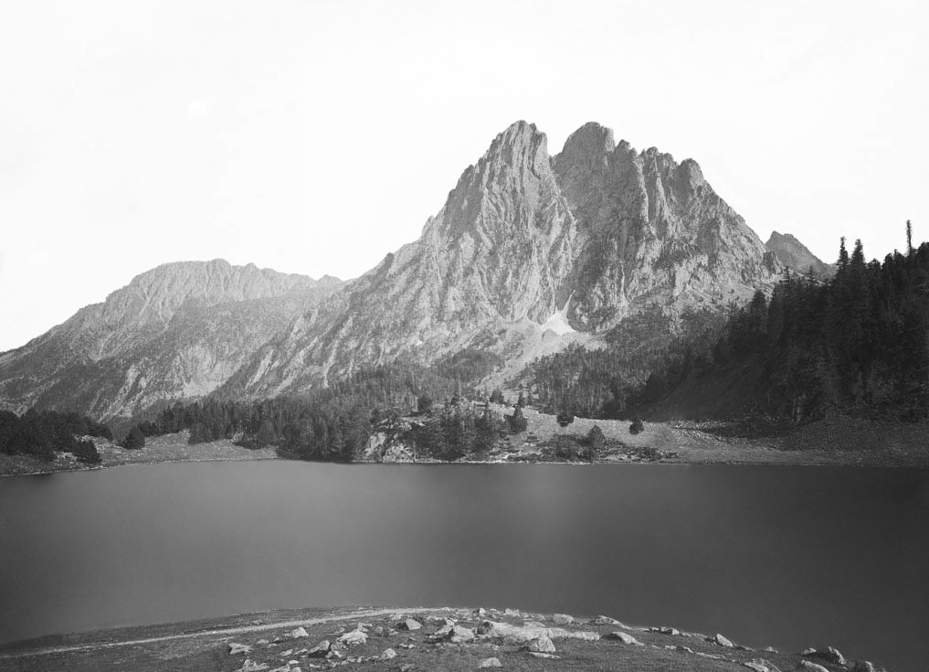 Imatge